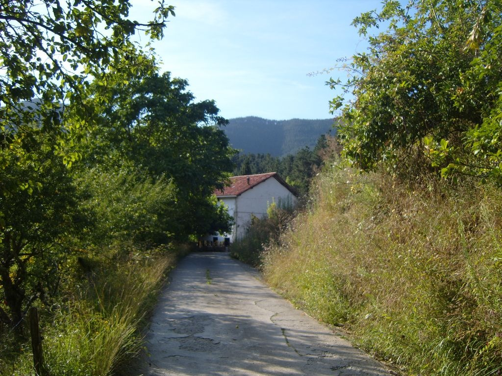 Mendaroko Emezabal baserria